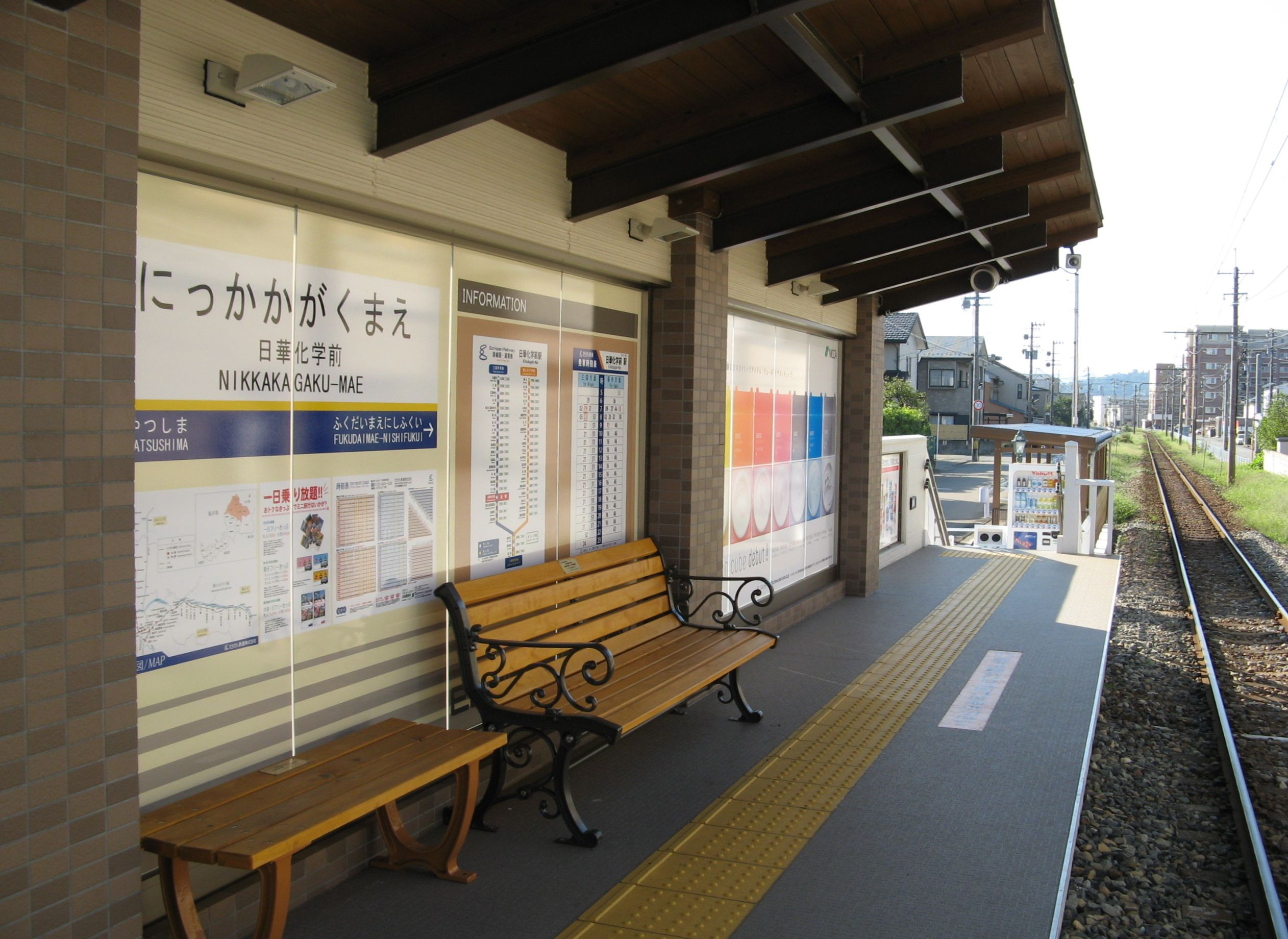 日華化学前駅 ホームから南望 ボード上にシールを貼った駅名標のため、縦に線が入っている